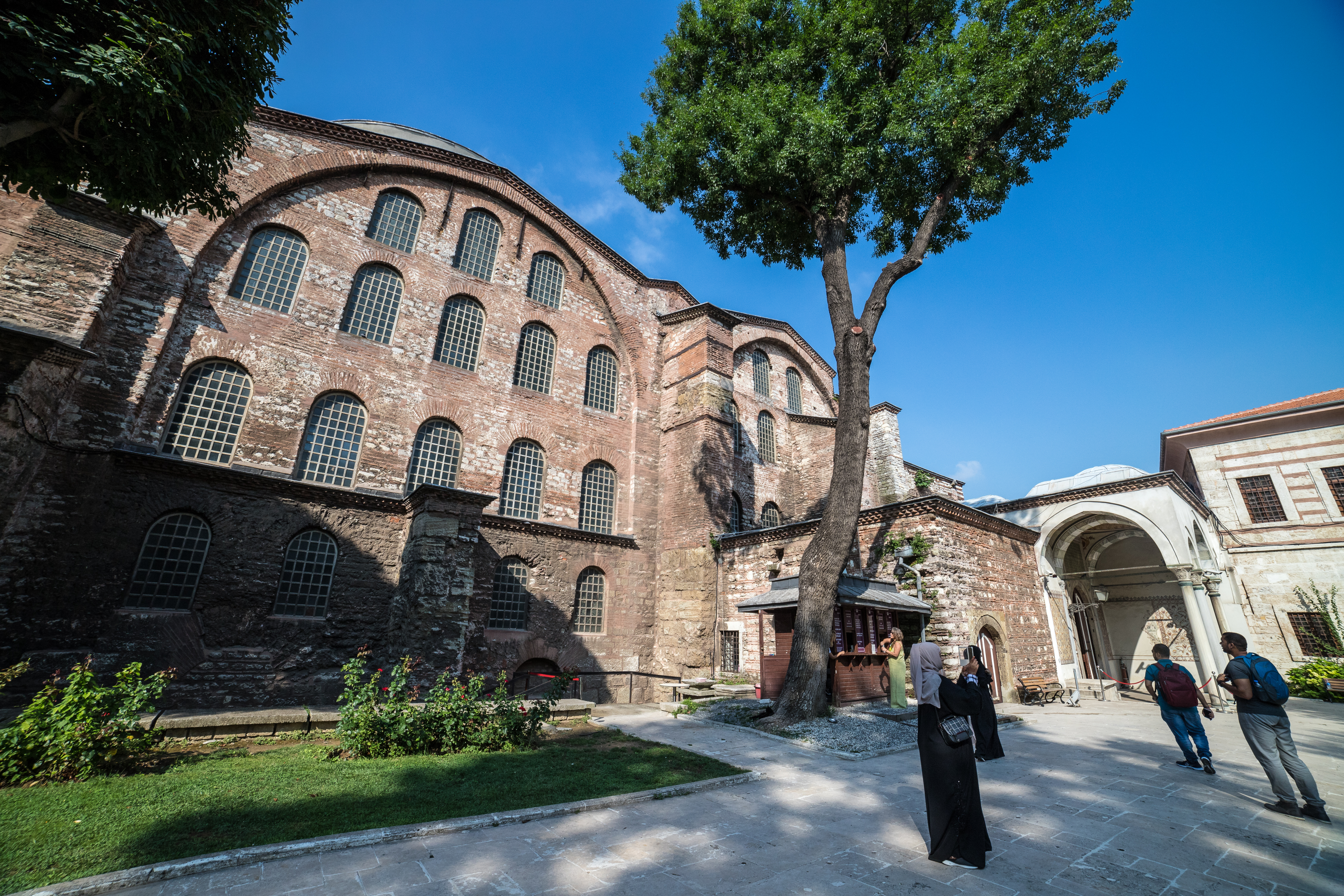 ingresso